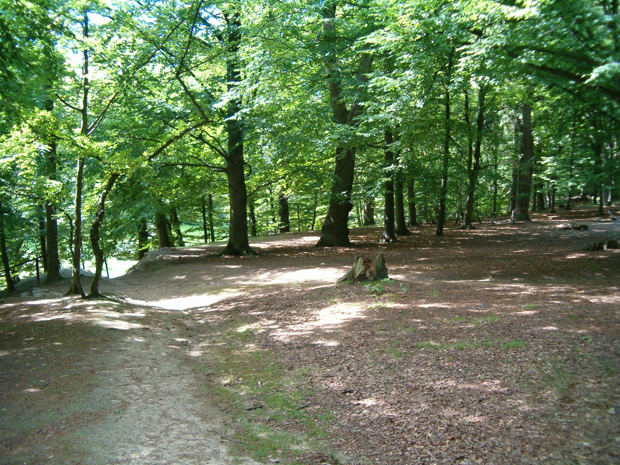 Bokskogen vid Ekebacken ovanför Ramlösadalen.